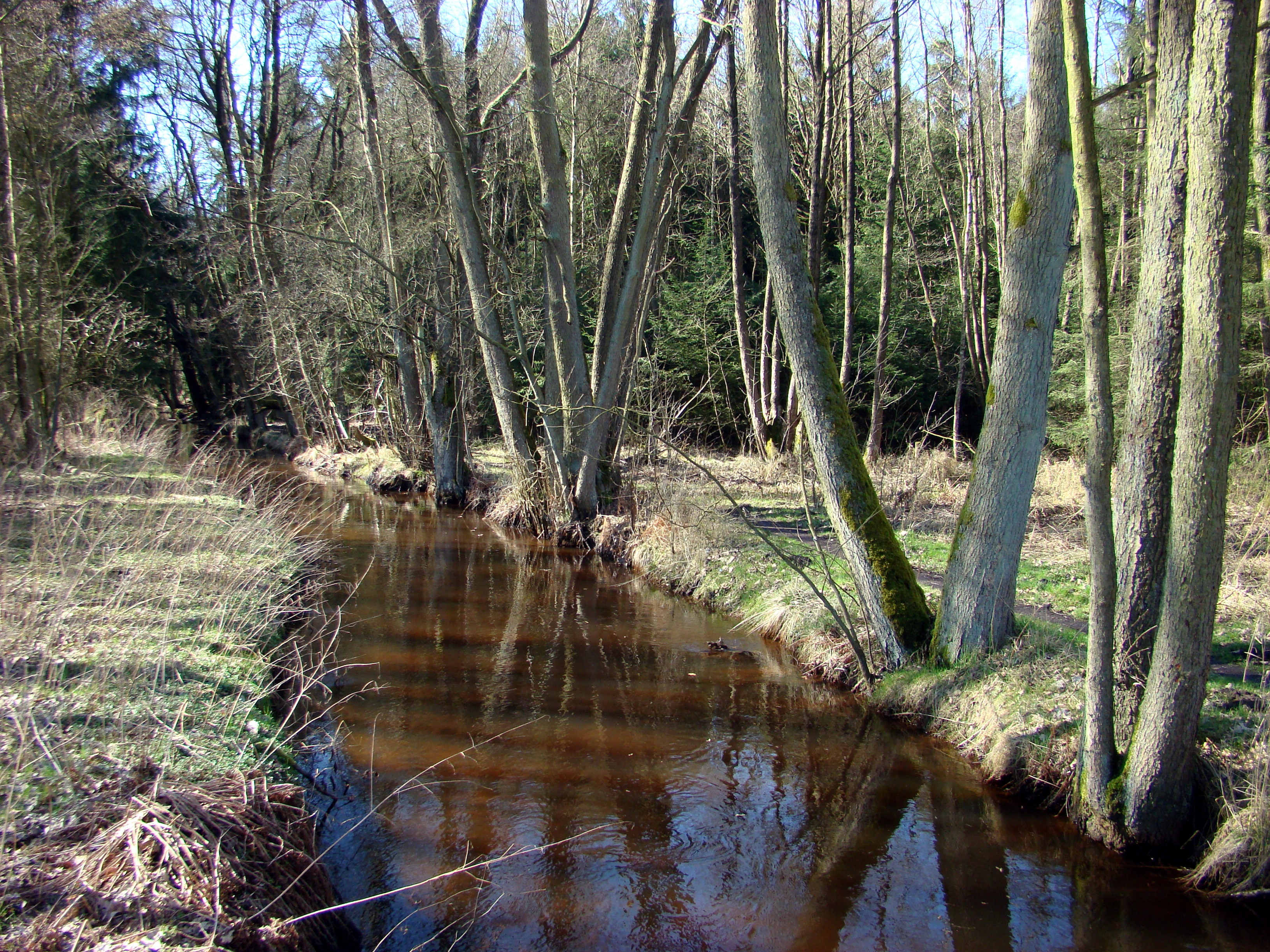 Die Aschau bei Eschede mit Erlenbruch